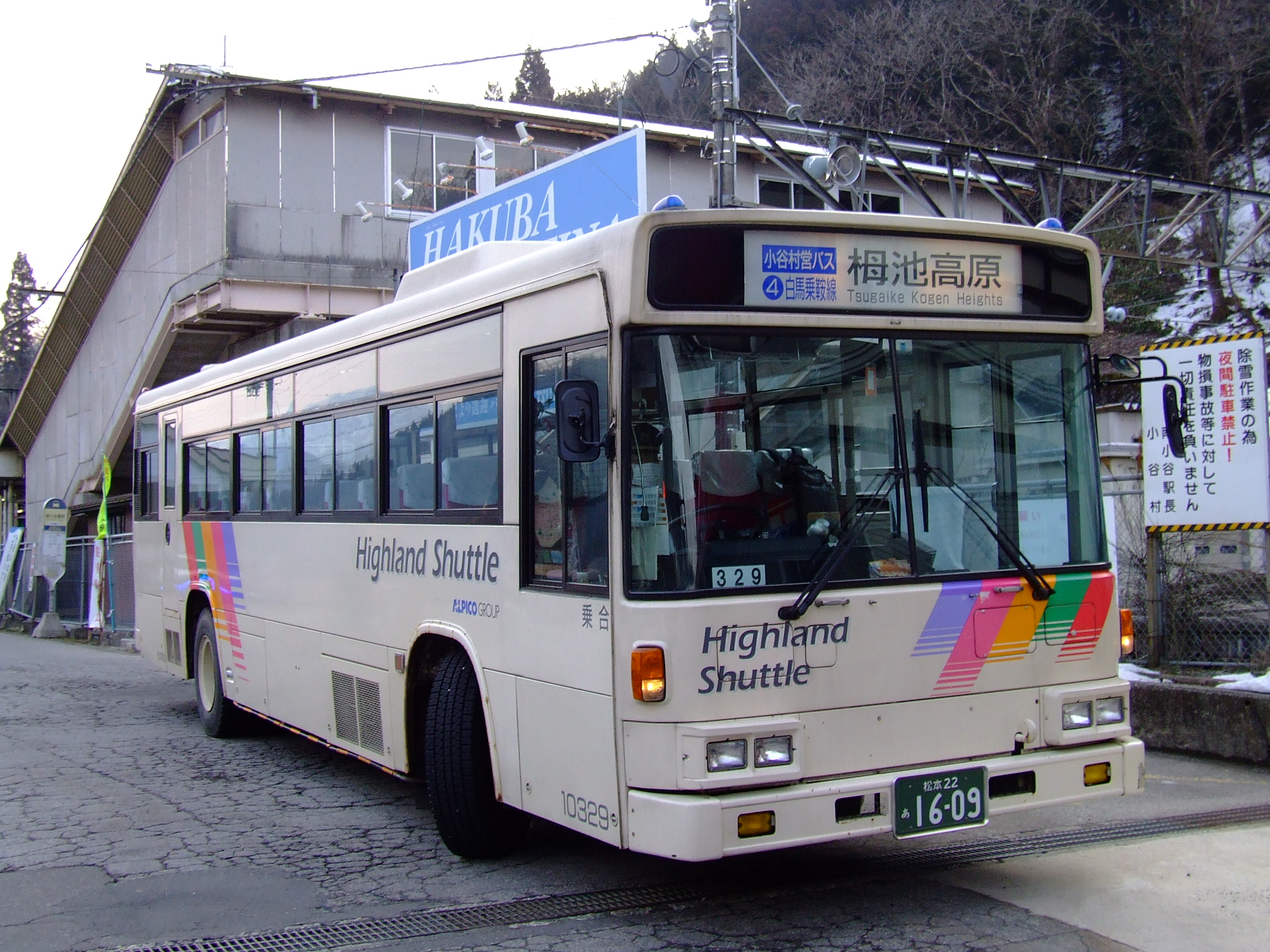 松本電気鉄道／小谷村営バス白馬乗鞍線 南小谷駅前にて いすゞU-LV318N 西日本車体工業製の車体は1993年の導入当時は東日本では珍しかった。